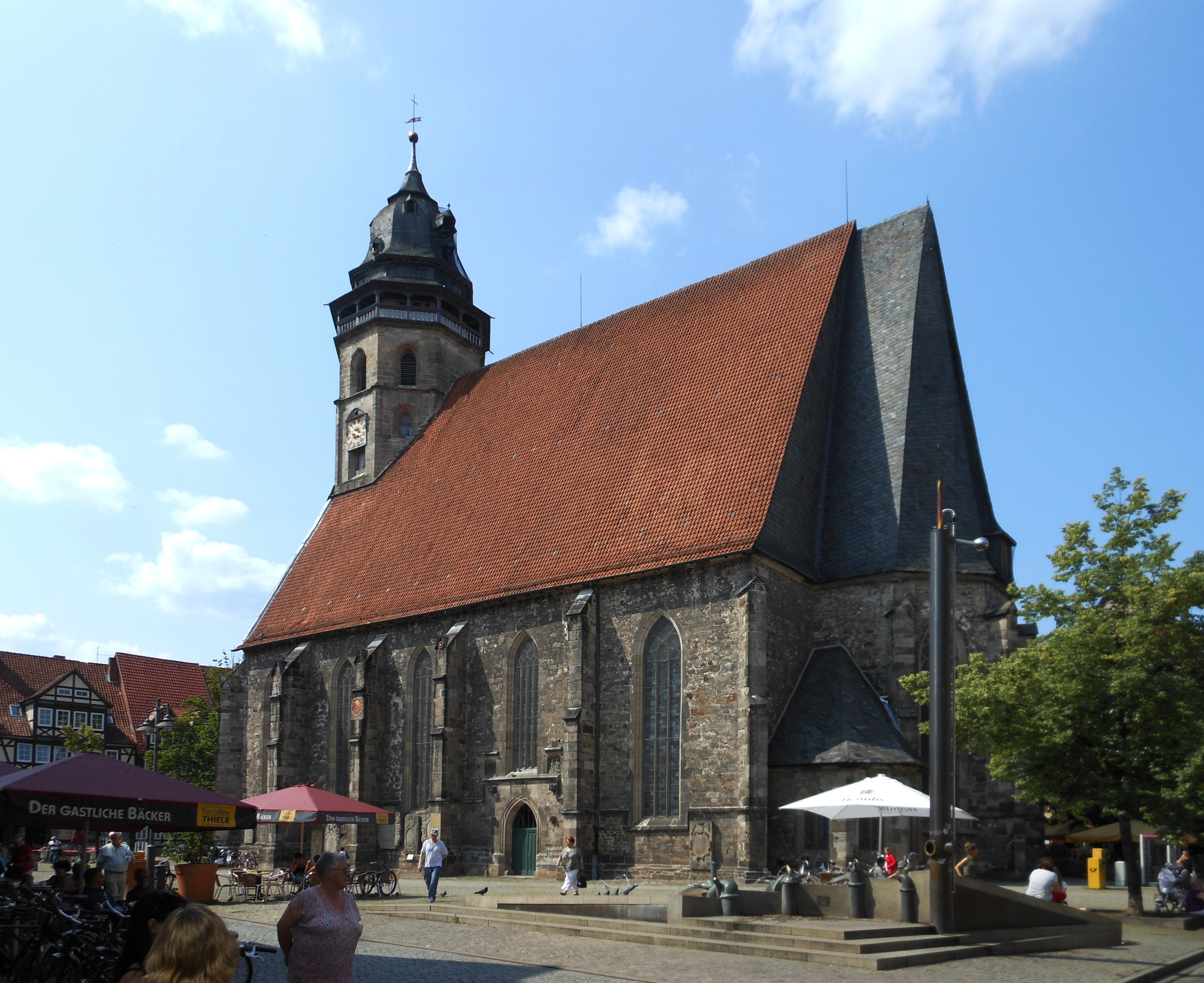 Hann. Münden, St.-Blasius-Kirche